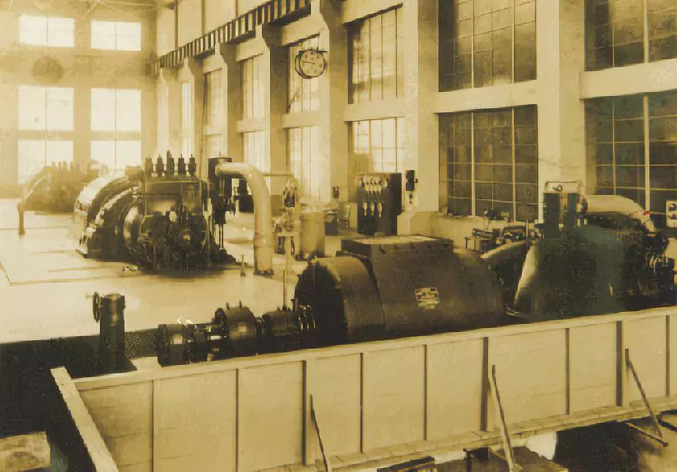 青岛四方发电所厂内三台机组